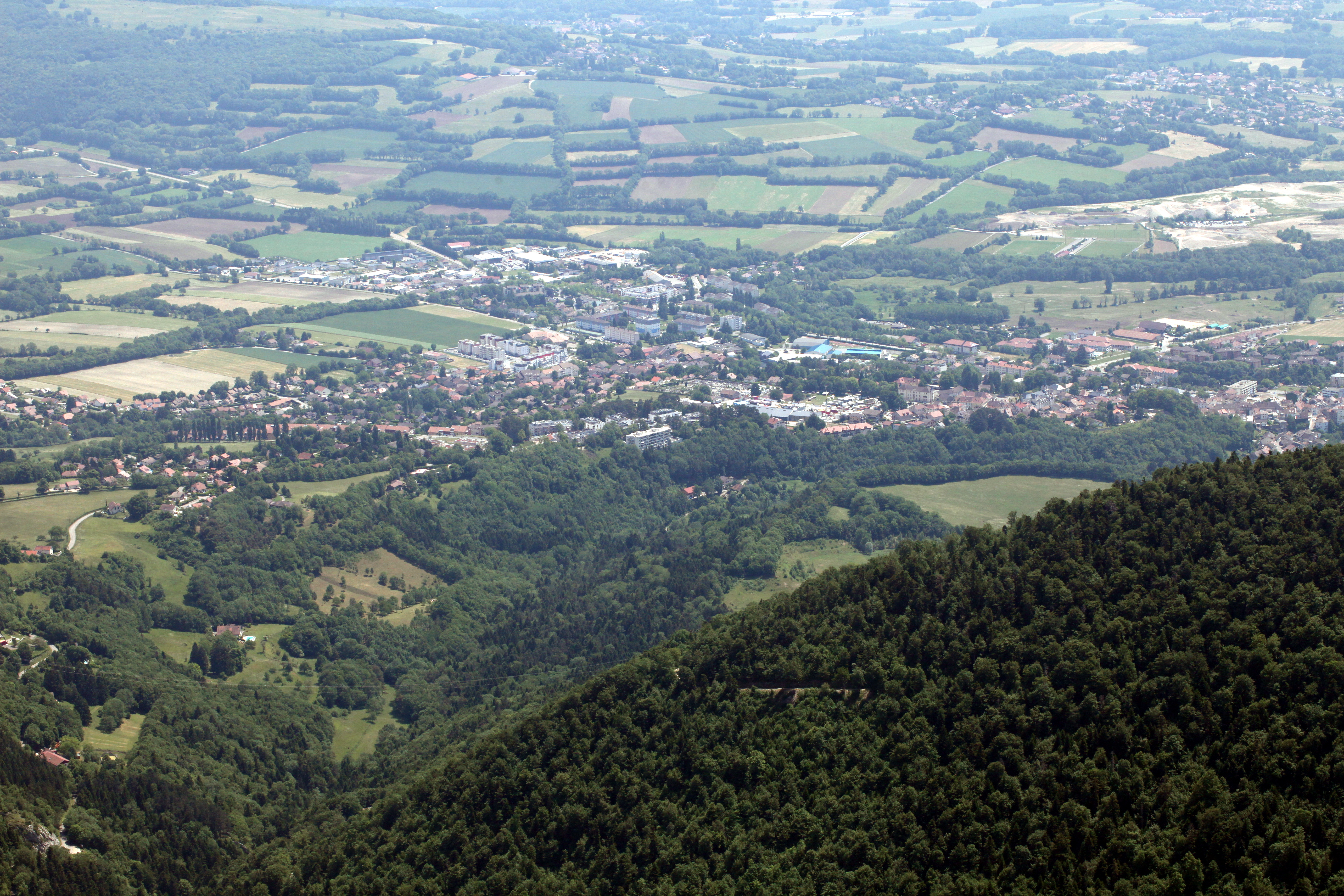 Vue de Gex depuis le Mont Rond.